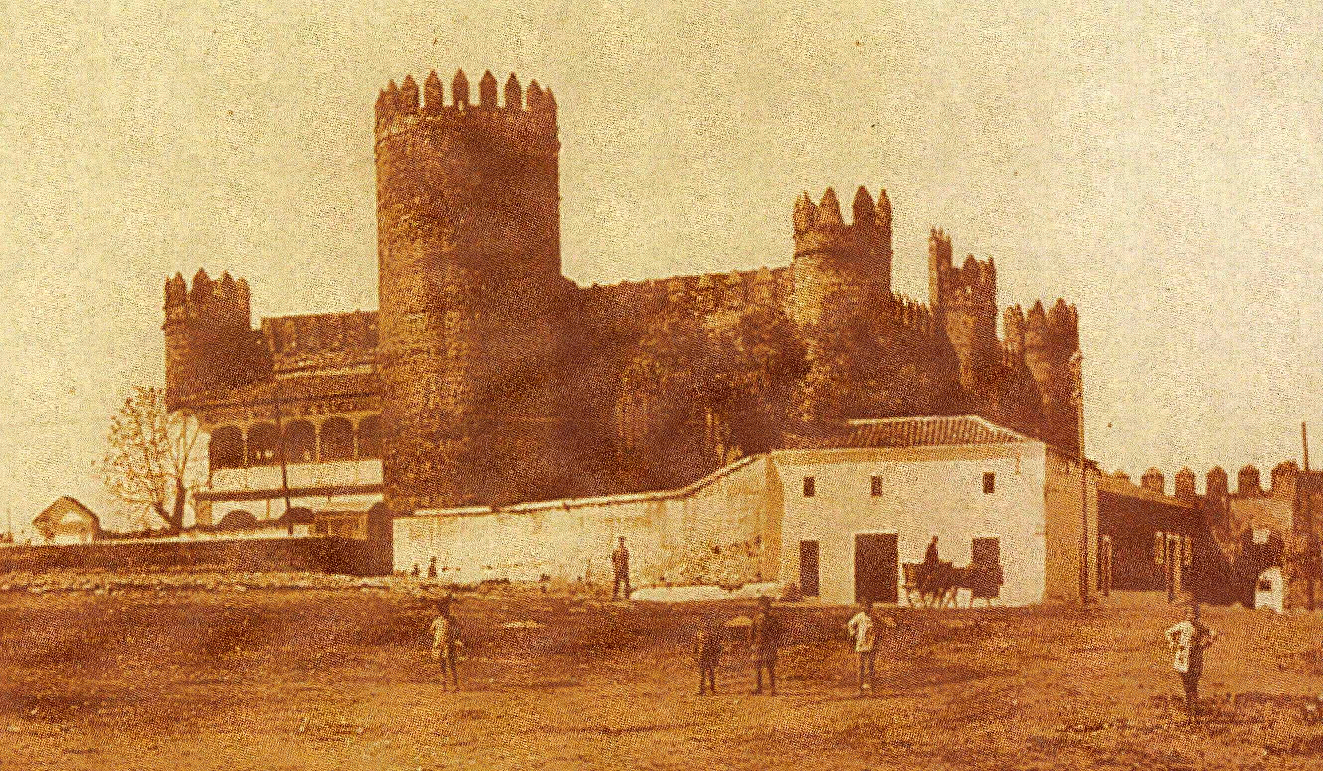 Palacio de los Duques de feria, imagen de principios del siglo XX.